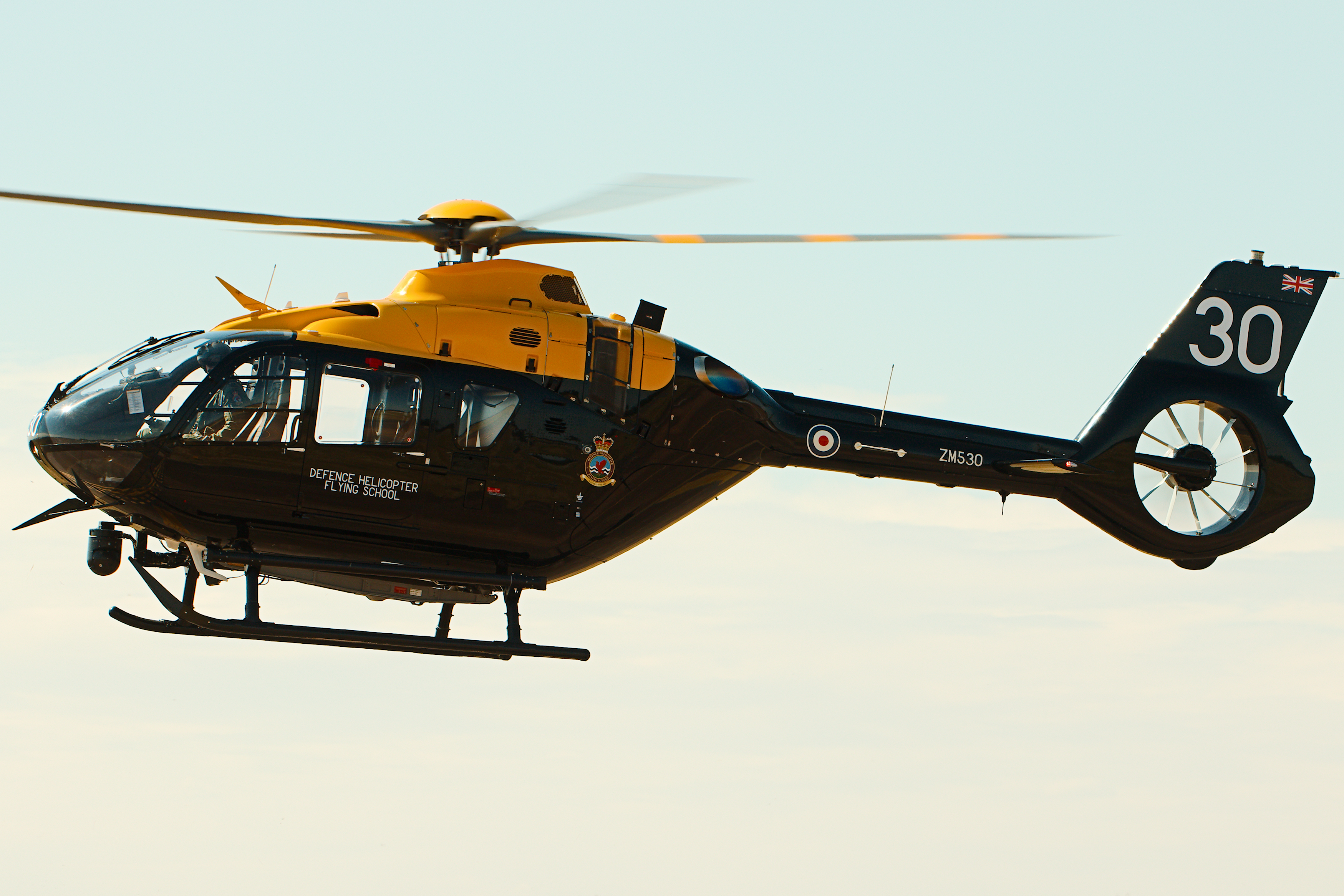 H135 Juno - RIAT 2018